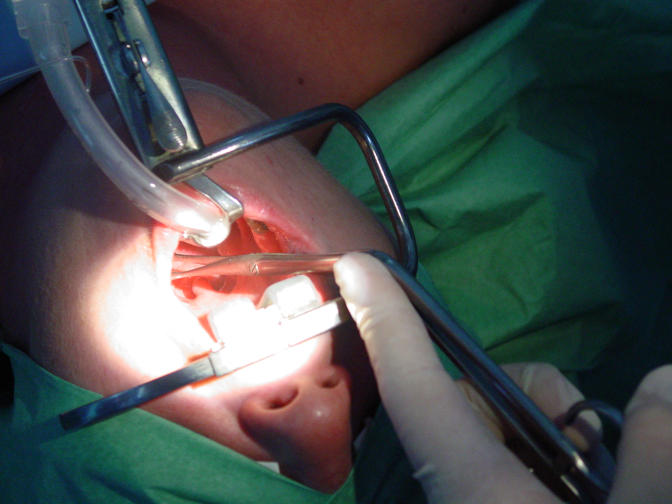 Tonsillektomie